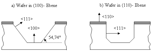 Ätzebenen in einem Si-Einkristall-Wafer